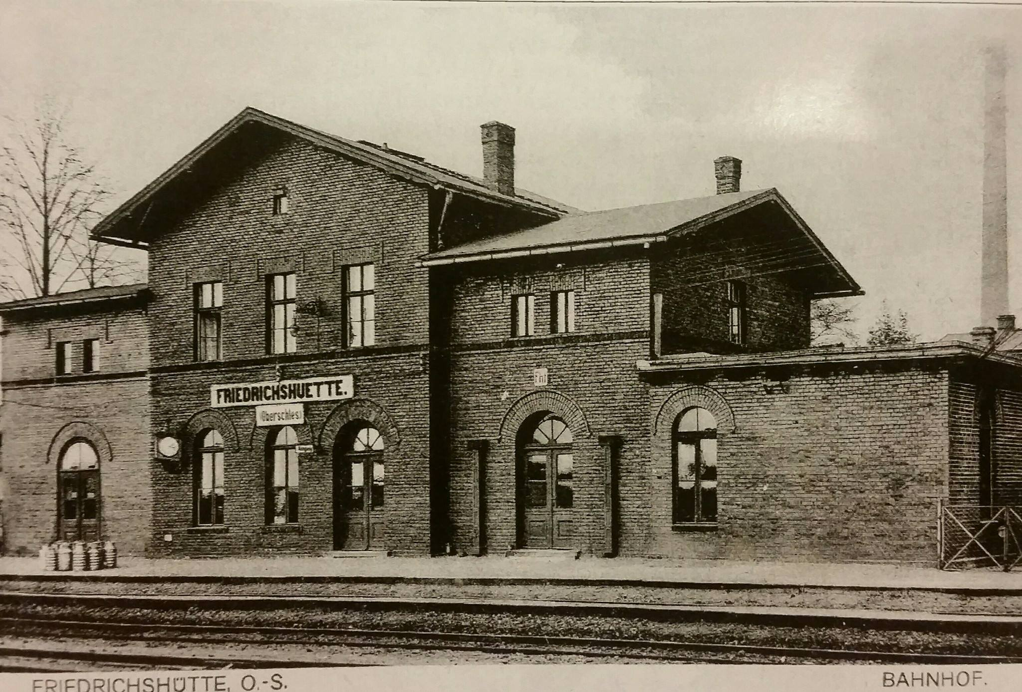 Dworzec kolejowy w Strzybnicy (Górny Śląsk) na starej pocztówce z 1916 roku